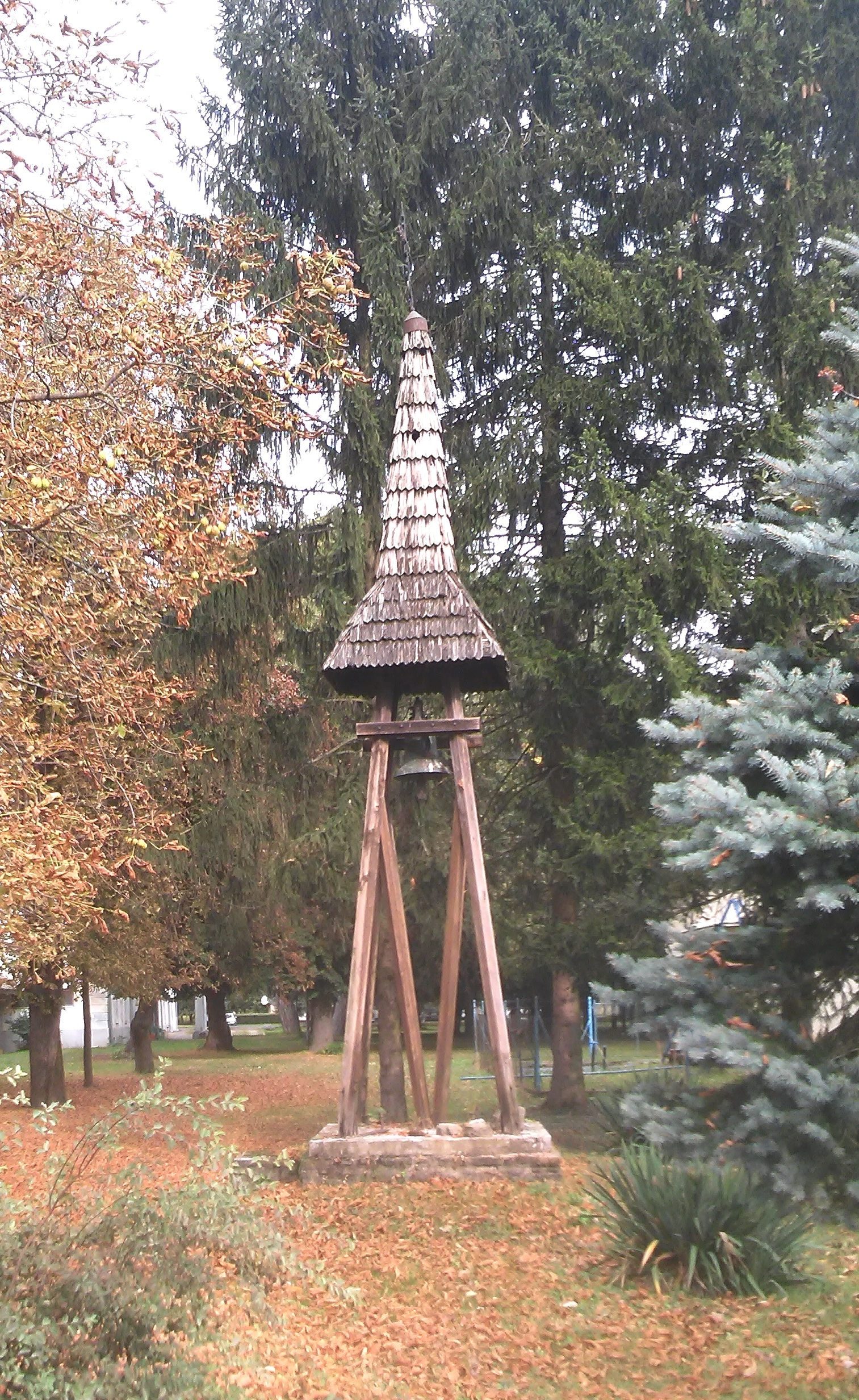 Harangláb az intaházai Batthyány-Strattmann-kastély (ma: Pszichiátriai és Addiktológiai Rehabilitációs Központ) parkjában.